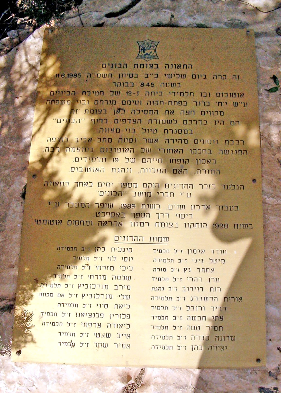 Habonim memorial plaque